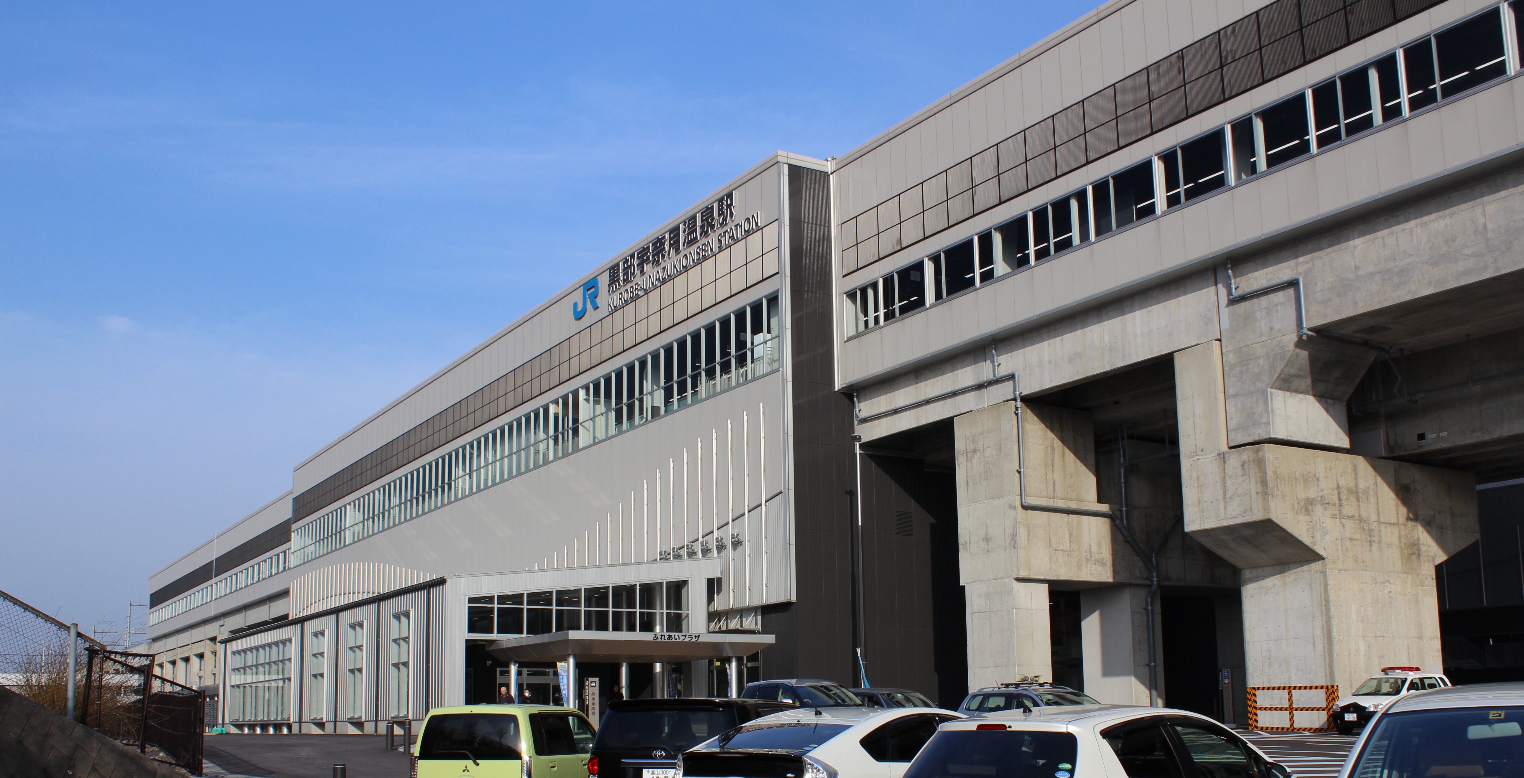 JR西日本 黒部宇奈月温泉駅 西口 富山県黒部市若栗3210-3